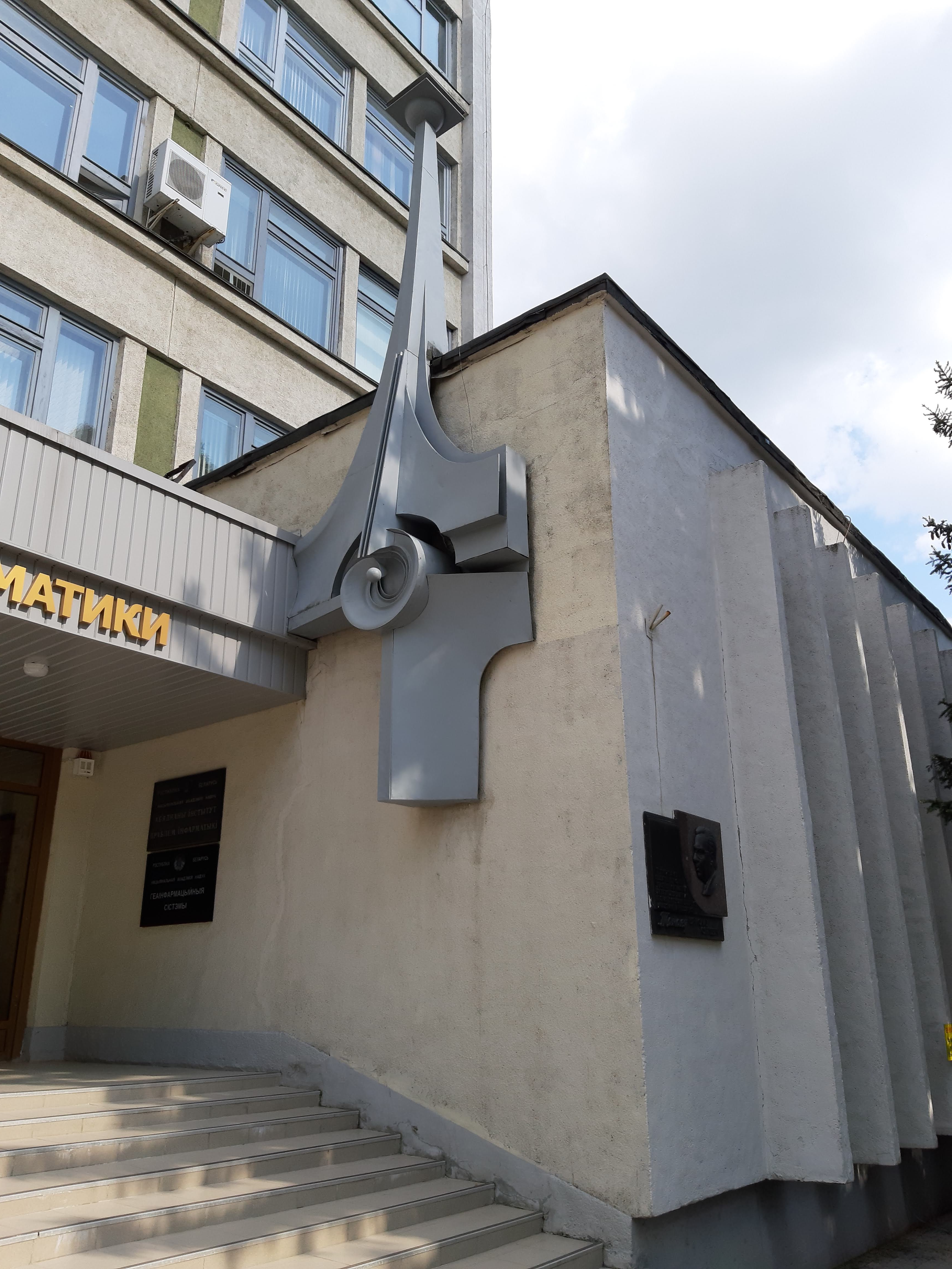 Мінск. Па Сурганава ў маі 2019